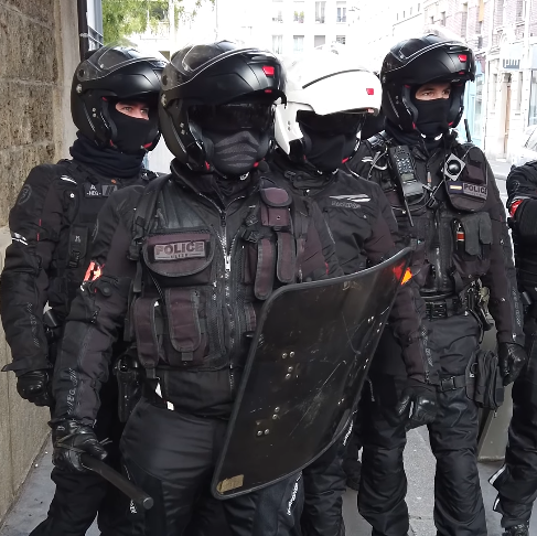 Groupement de BRAV-M lors d'une manifestation